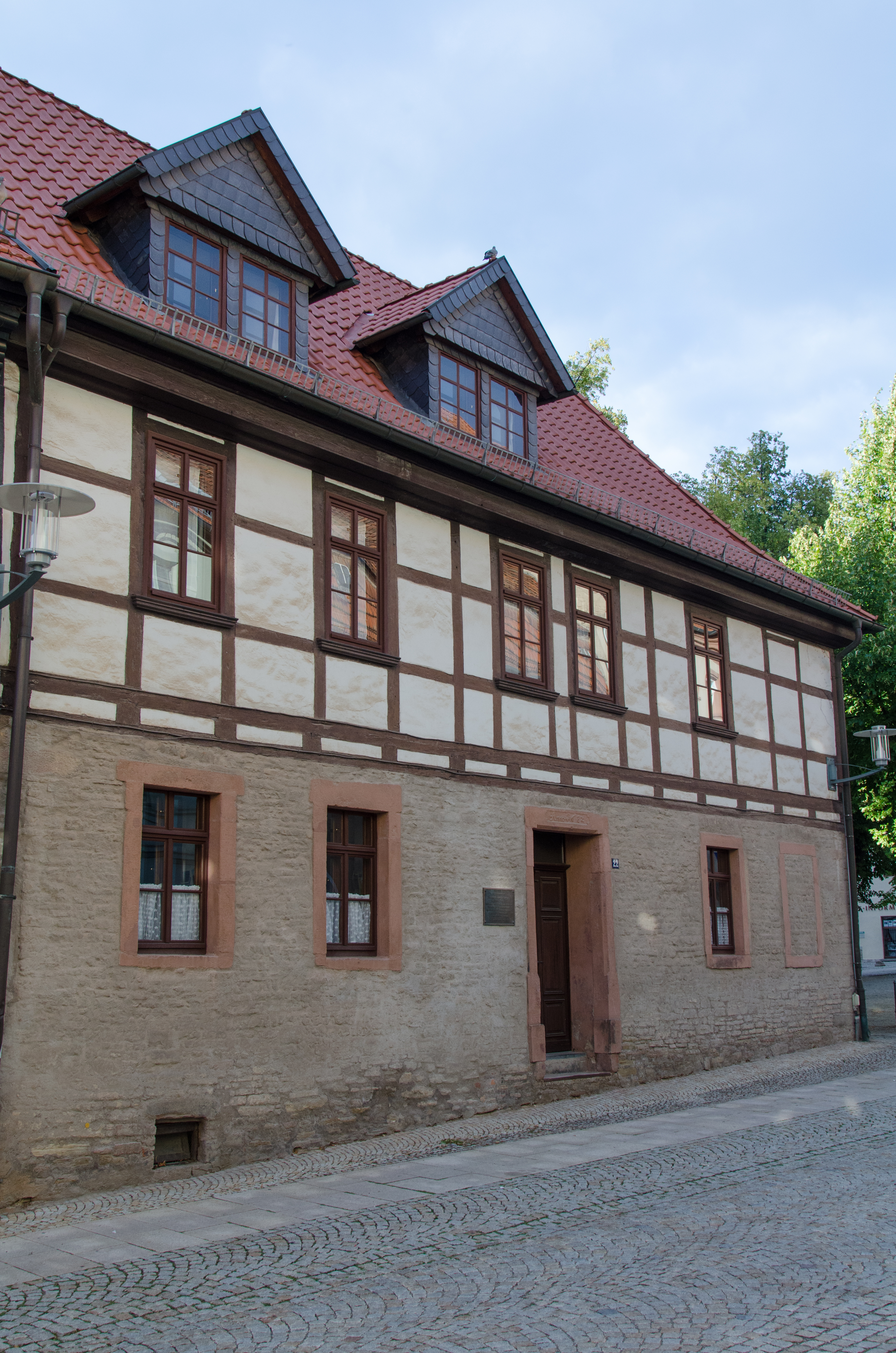 Sangerhausen, Markt 22